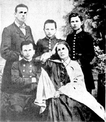 Беларуская (тарашкевіца): Брыгіда Зан (народжаная Сьвентаржэцкая) з сынамі. Сядзіць — Абдон, стаяць (зьлева направа) — гувэрнэр, Віктарын і Клемэнт.